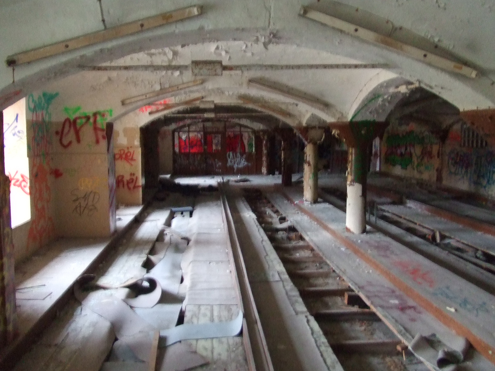 Böhmisches Brauhaus Berlin